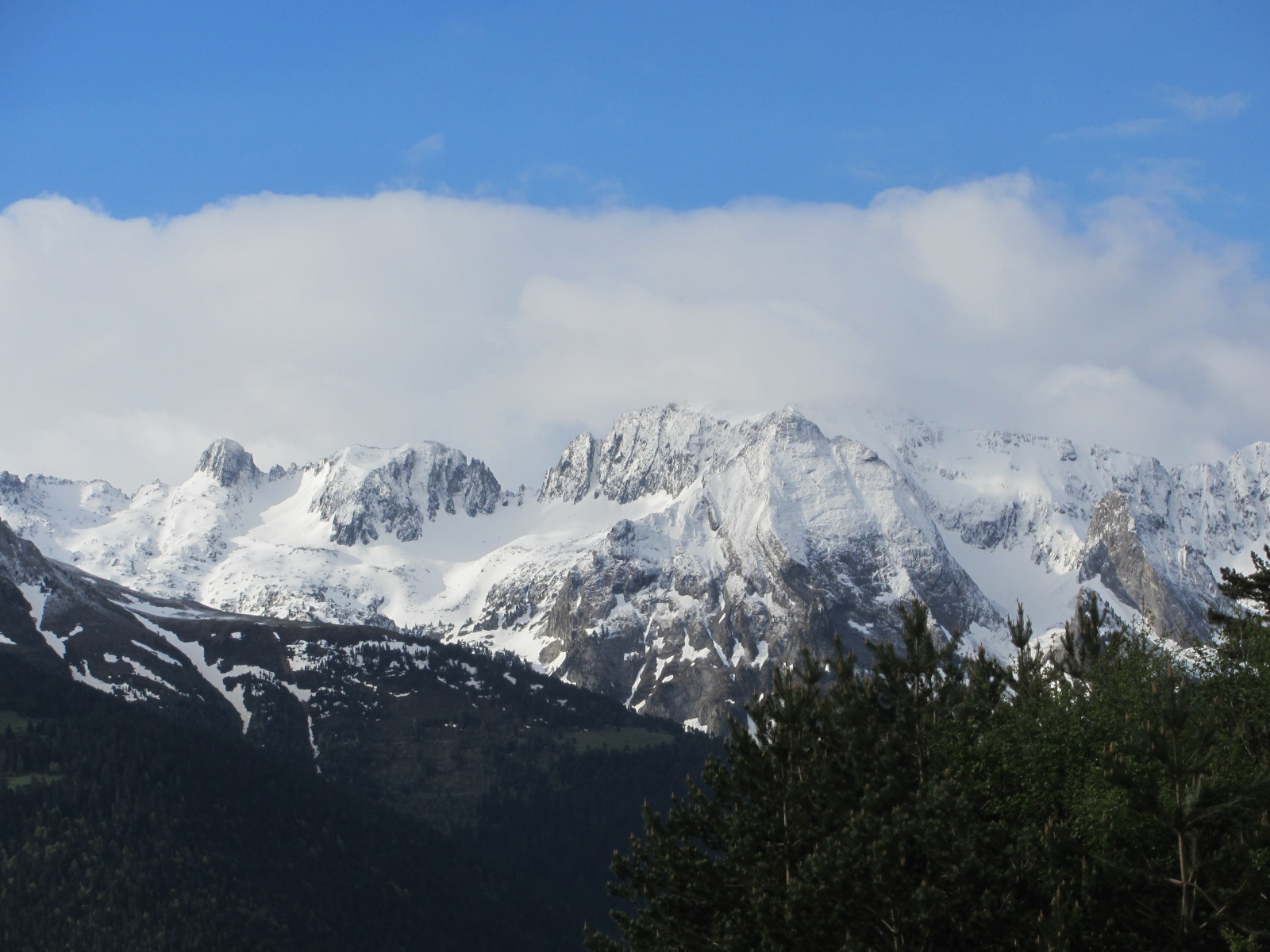 Pala de Sarrahera i Tuc des Hemnes